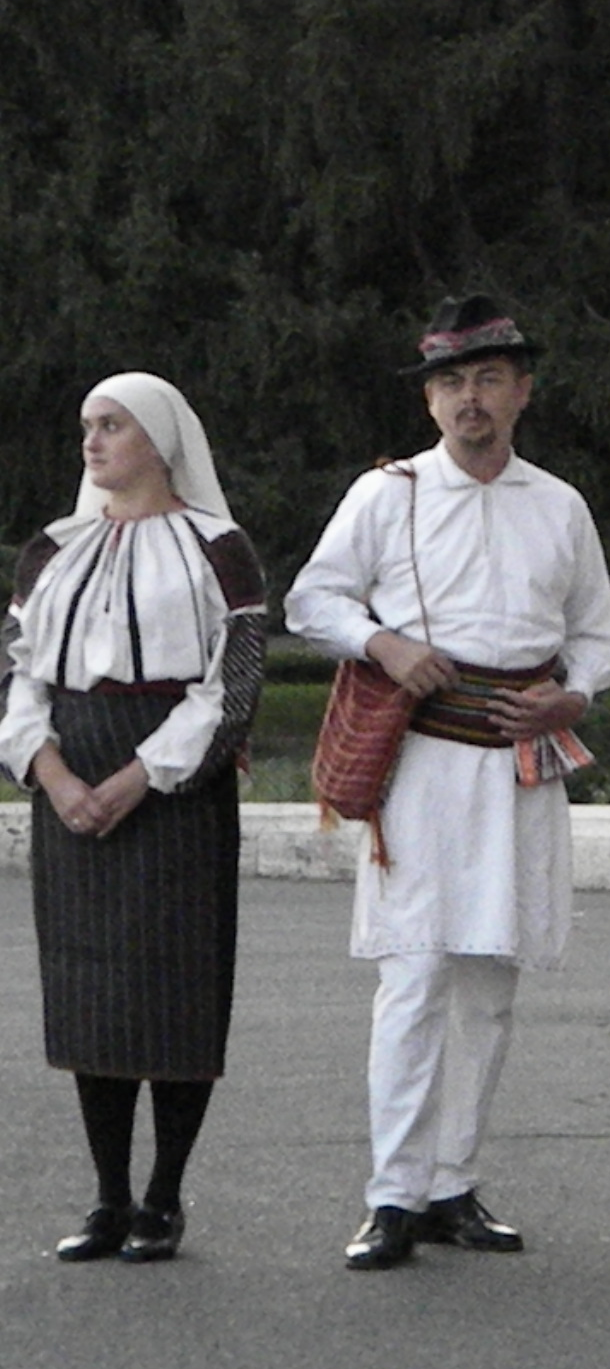 Csángó viseletRomână: Port popular ceangăiesc din Moldova.